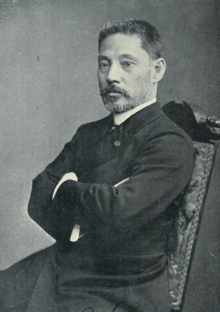 栗野真一郎 フランス公使時代